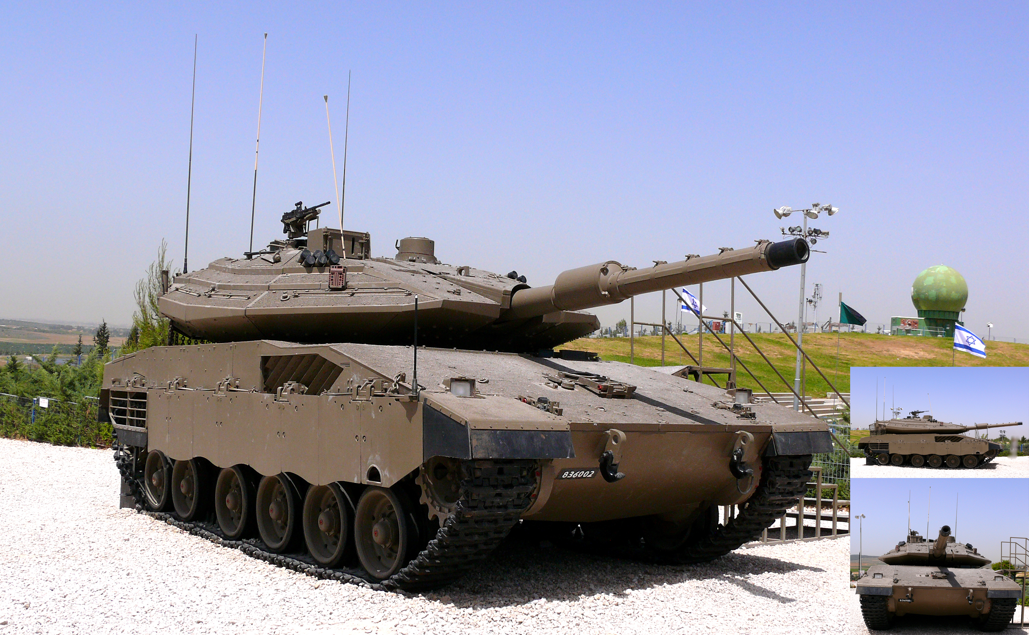 Merkava Mk4 Main Battle Tank in Yad LaShirion, Latrun, Israel טנק מרכבה סימן 4 ביד לשריון, לטרון, ישראל